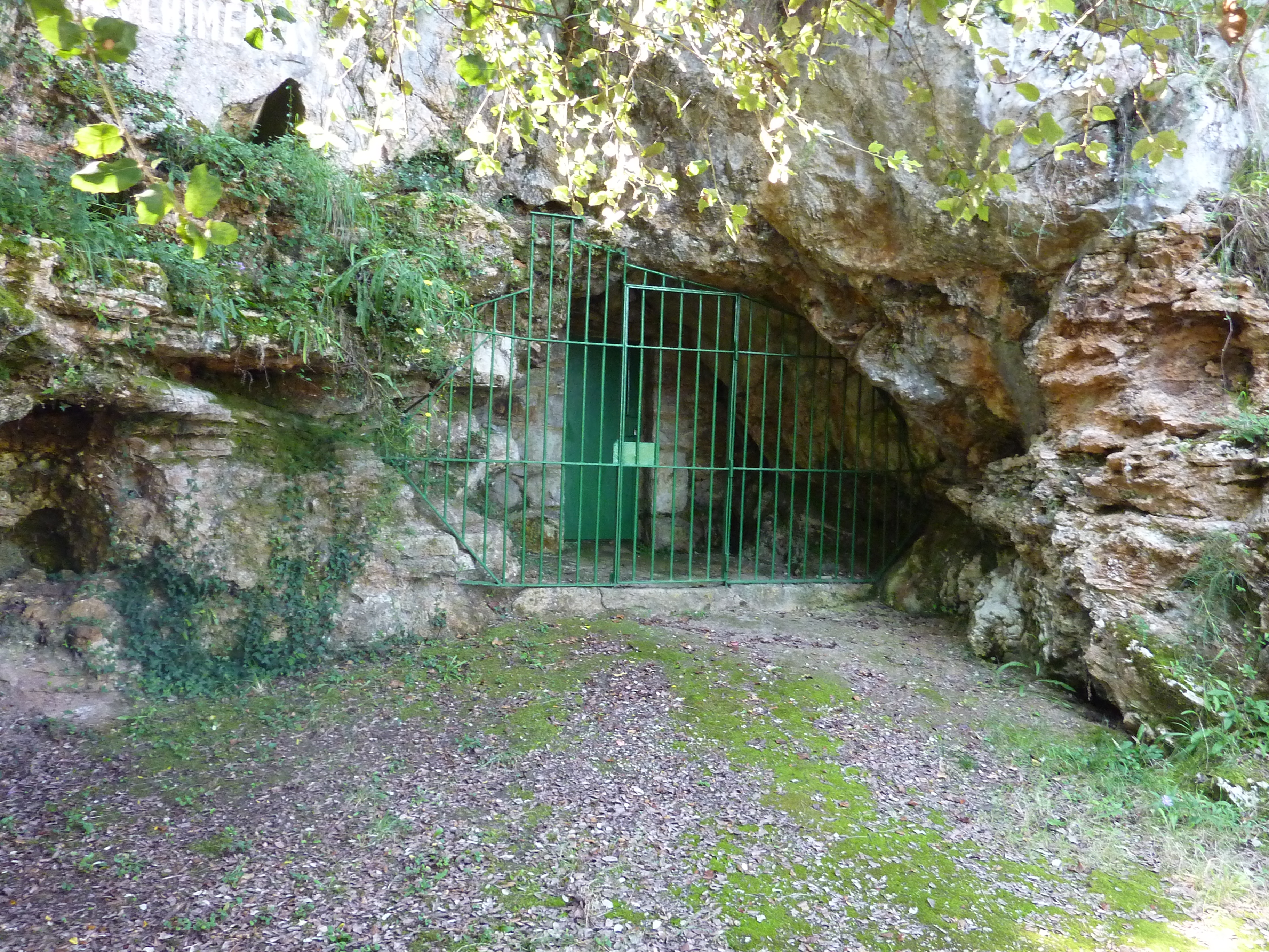 Cueva.